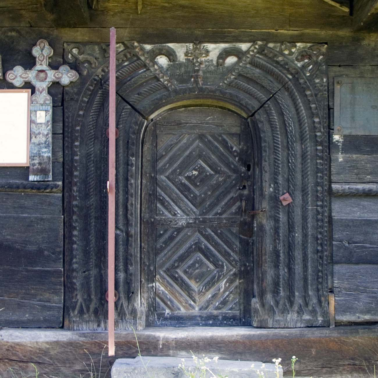 Rieni, Bihor: biserica de lemn. Portalul de la intrare, pe latura de sud.